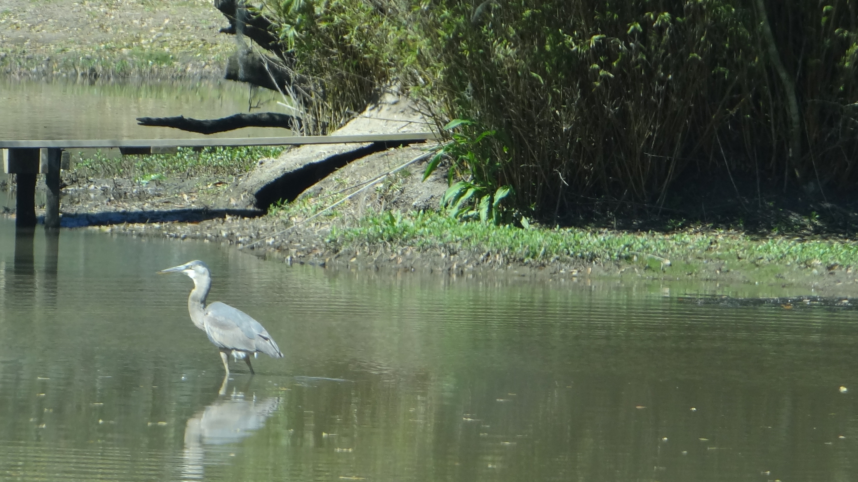 Avery Island et Tabasci, Louisiane, USA